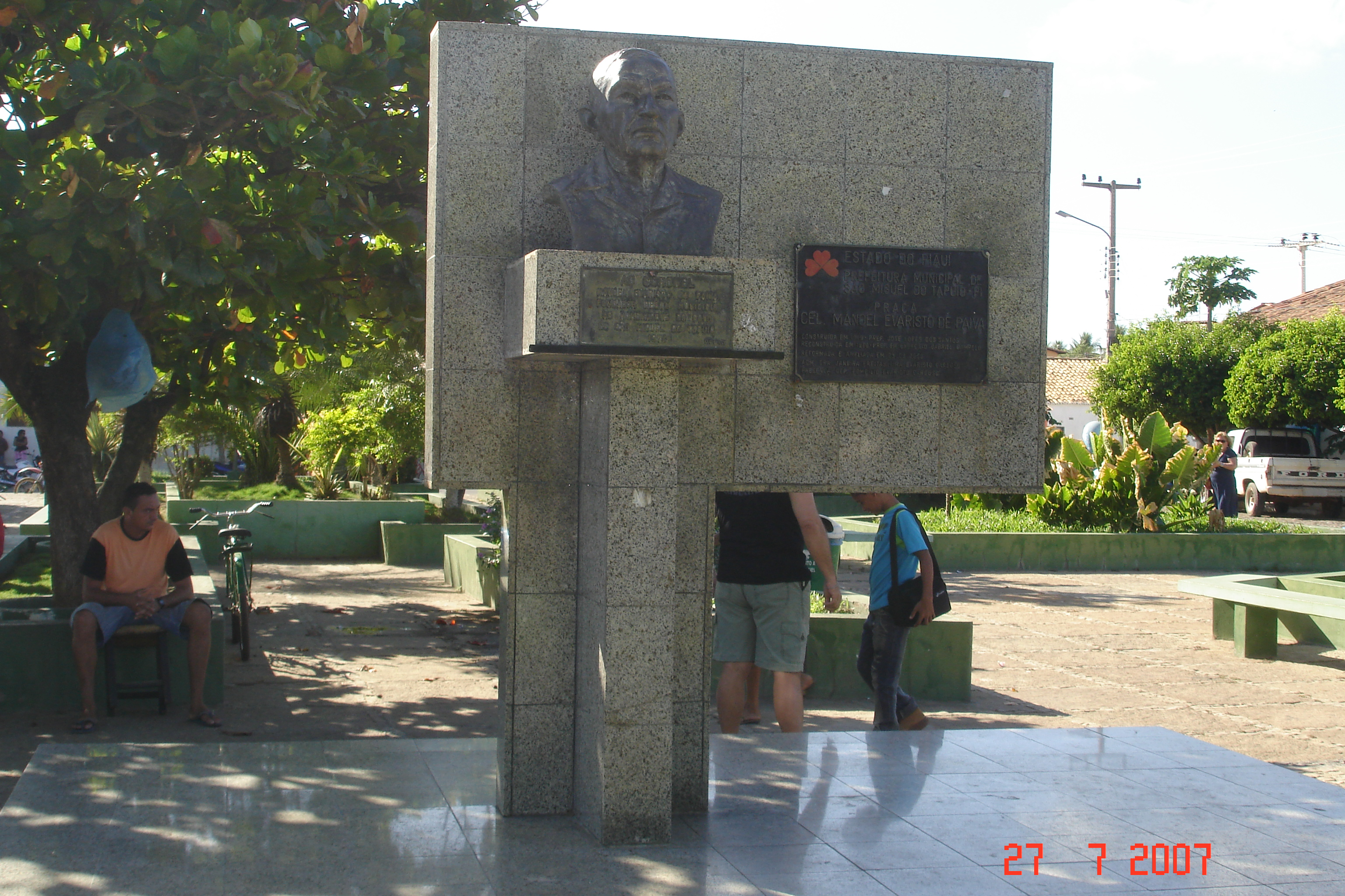 Busto do Coronel Manoel Evaristo de Paiva, na praça de mesmo nome, fundador da cidade de São Miguel do Tapuio, Brasil